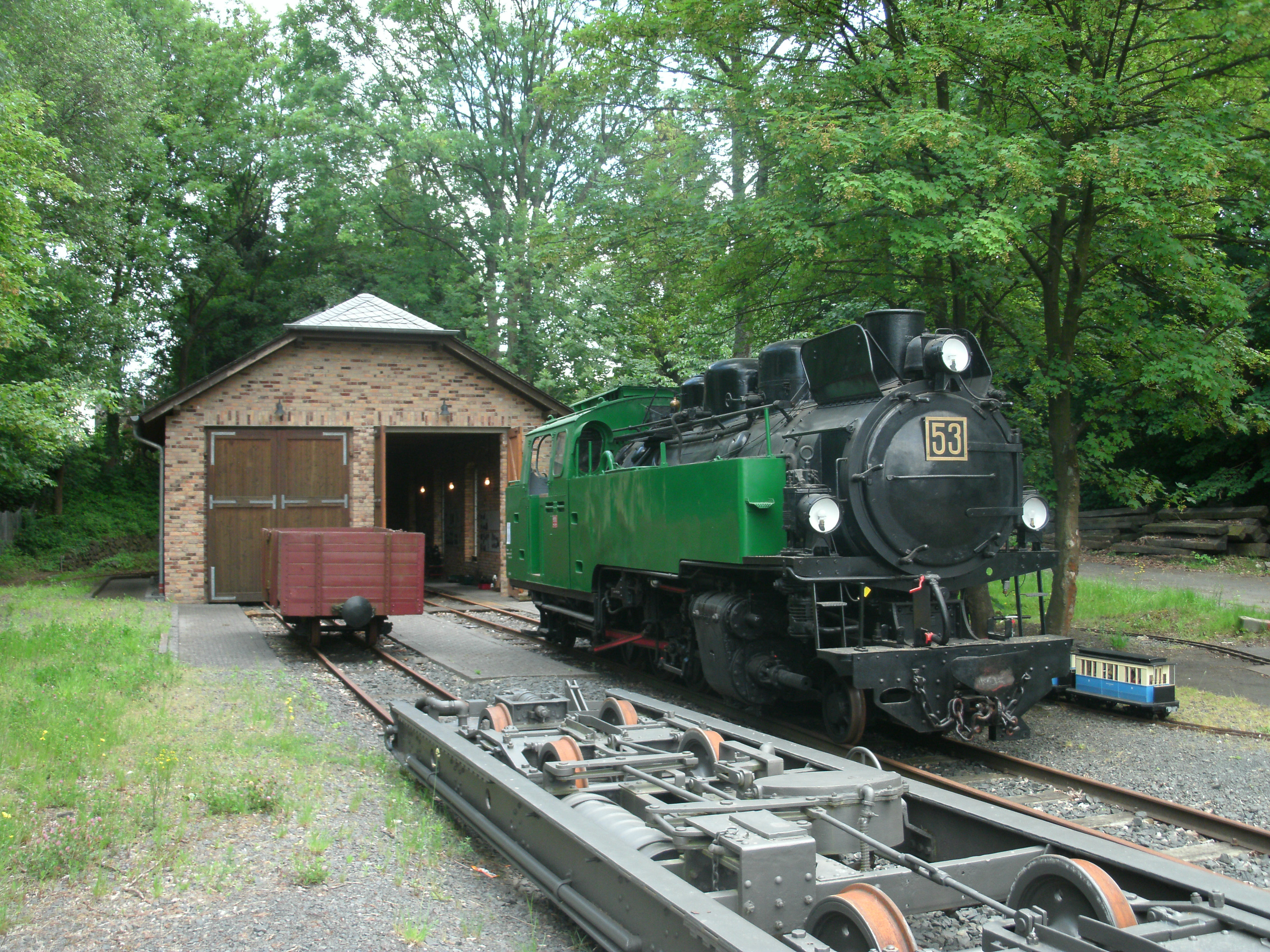 Der Lokschuppen des RSE-Museums/Bröltalbahnmuseums in Asbach (Westerwald) mit der Dampflok 53 der Bröltalbahn und einigen Güterwagen